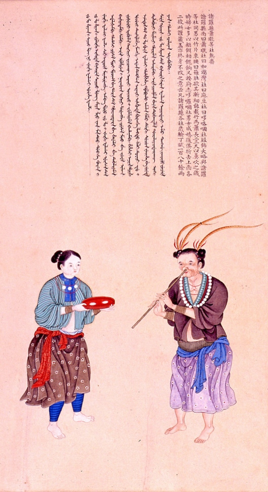 中文（香港）: 清 謝遂 職貢圖